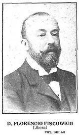 Retrato de Florencio Fiscowich, fotografía de Debás recogida en la revista española Nuevo Mundo.